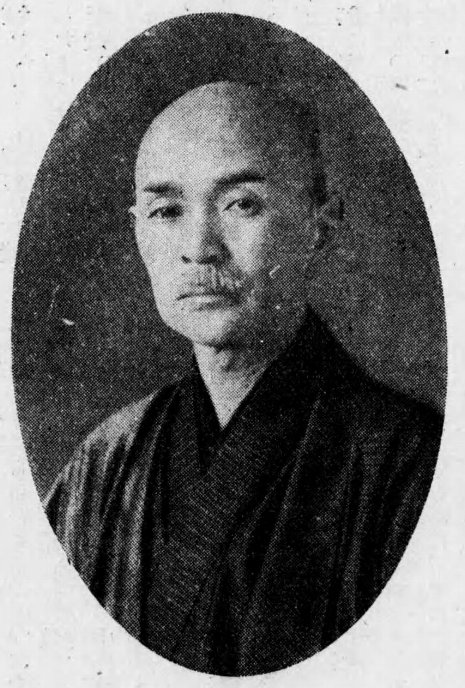 高嶋米峰（1875-1949）